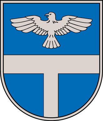 Coat of arms of Līvānu novads, Latvia